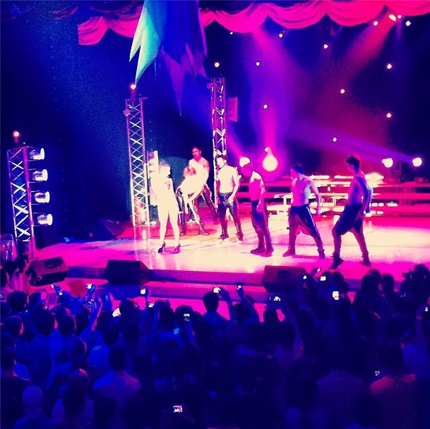 cantando Dance en Viña del Mar